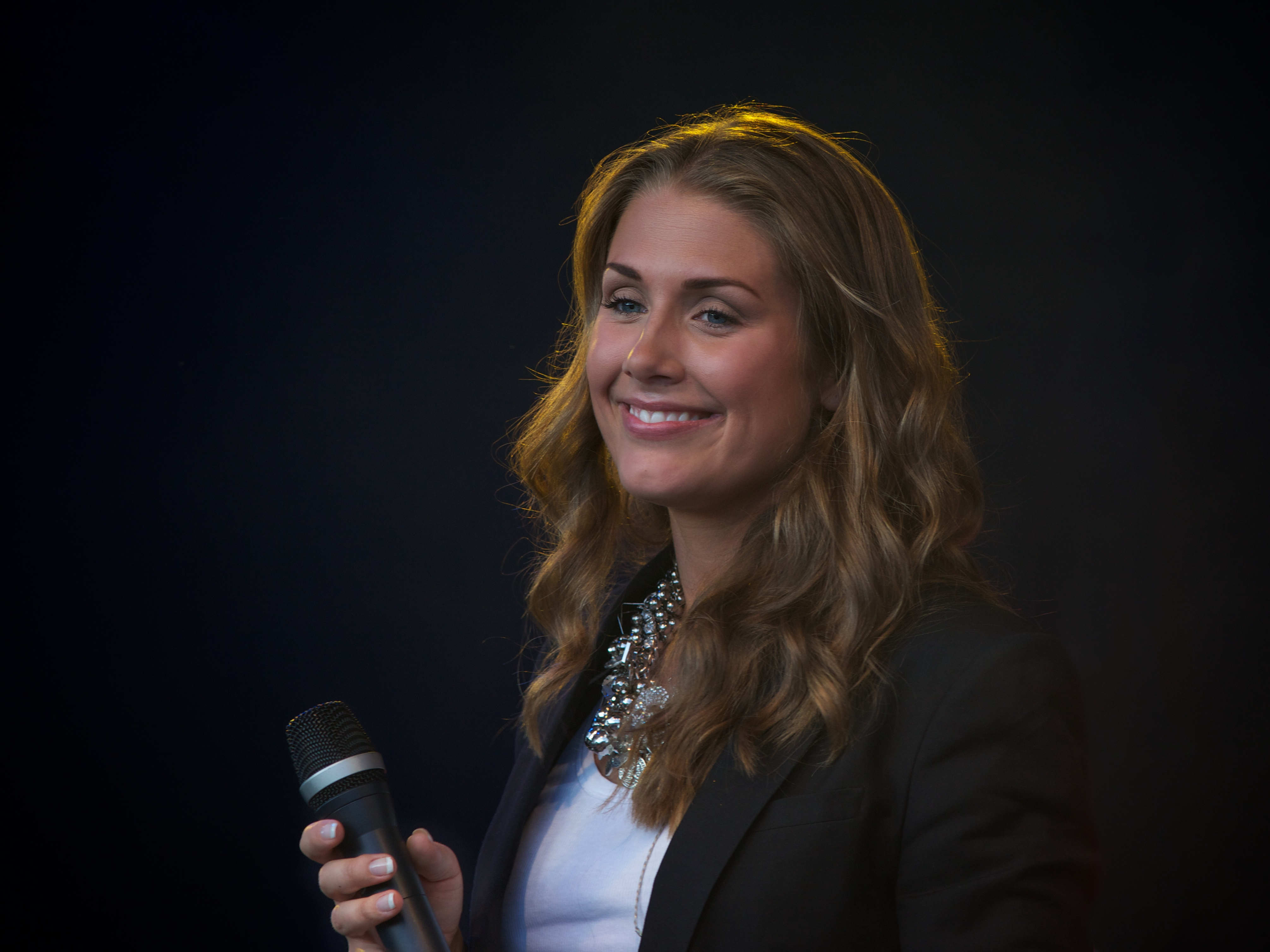 Tone Damli Aaberge på Sluserock 2011 i Lunde Telemark